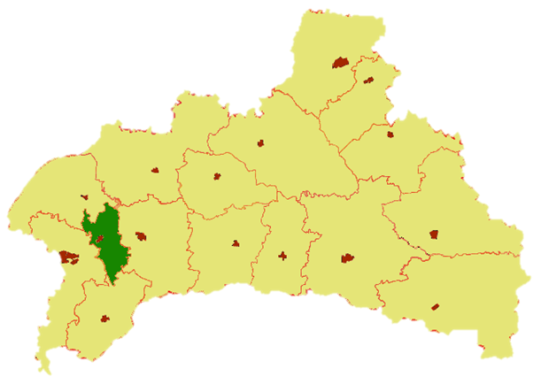 Žabinkaŭský rajón v rámci Brestské oblasti